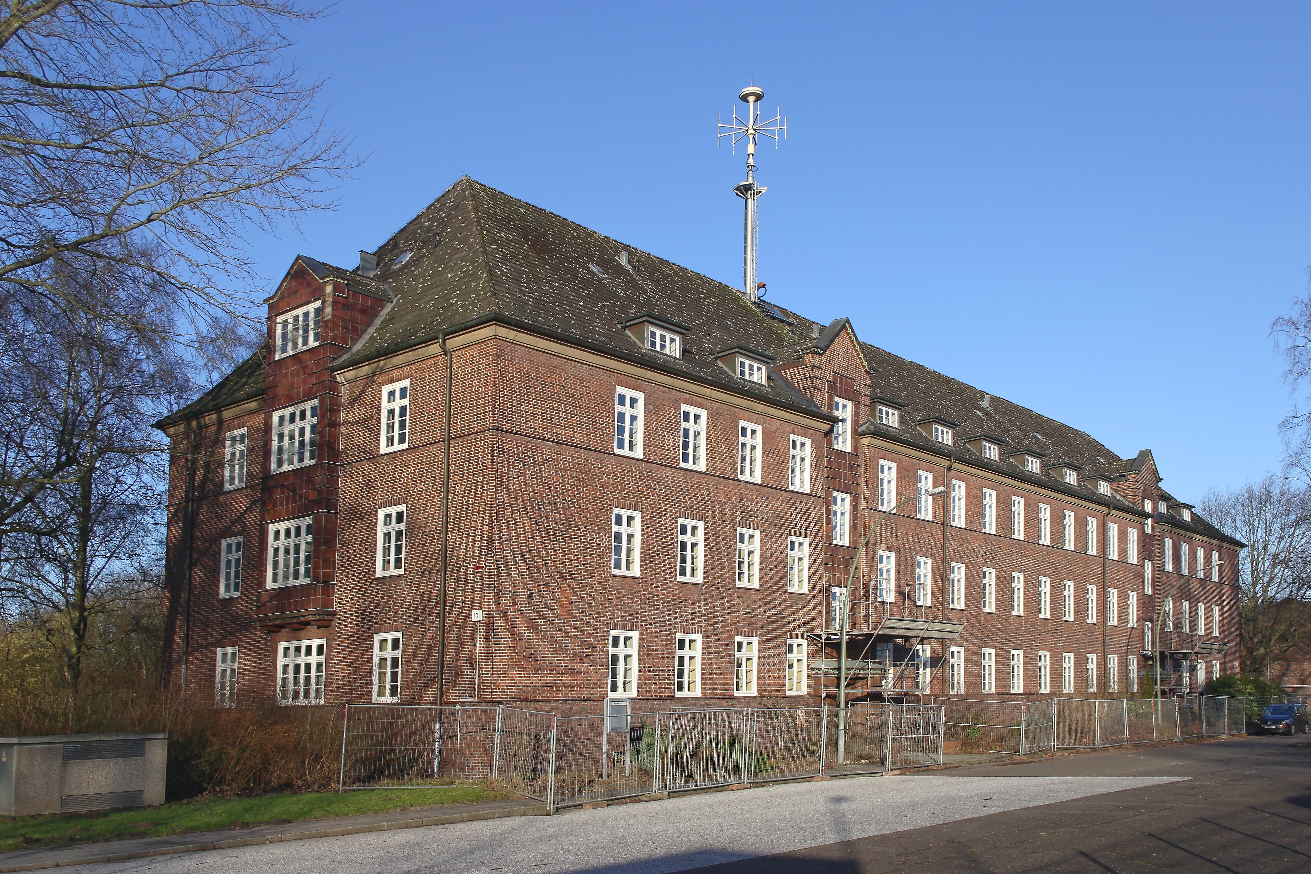 Hamburg-Rahlstedt, ehemalige Graf-Glotz-Kaserne, Gebäude des Zollfahndungsamtes Hamburg